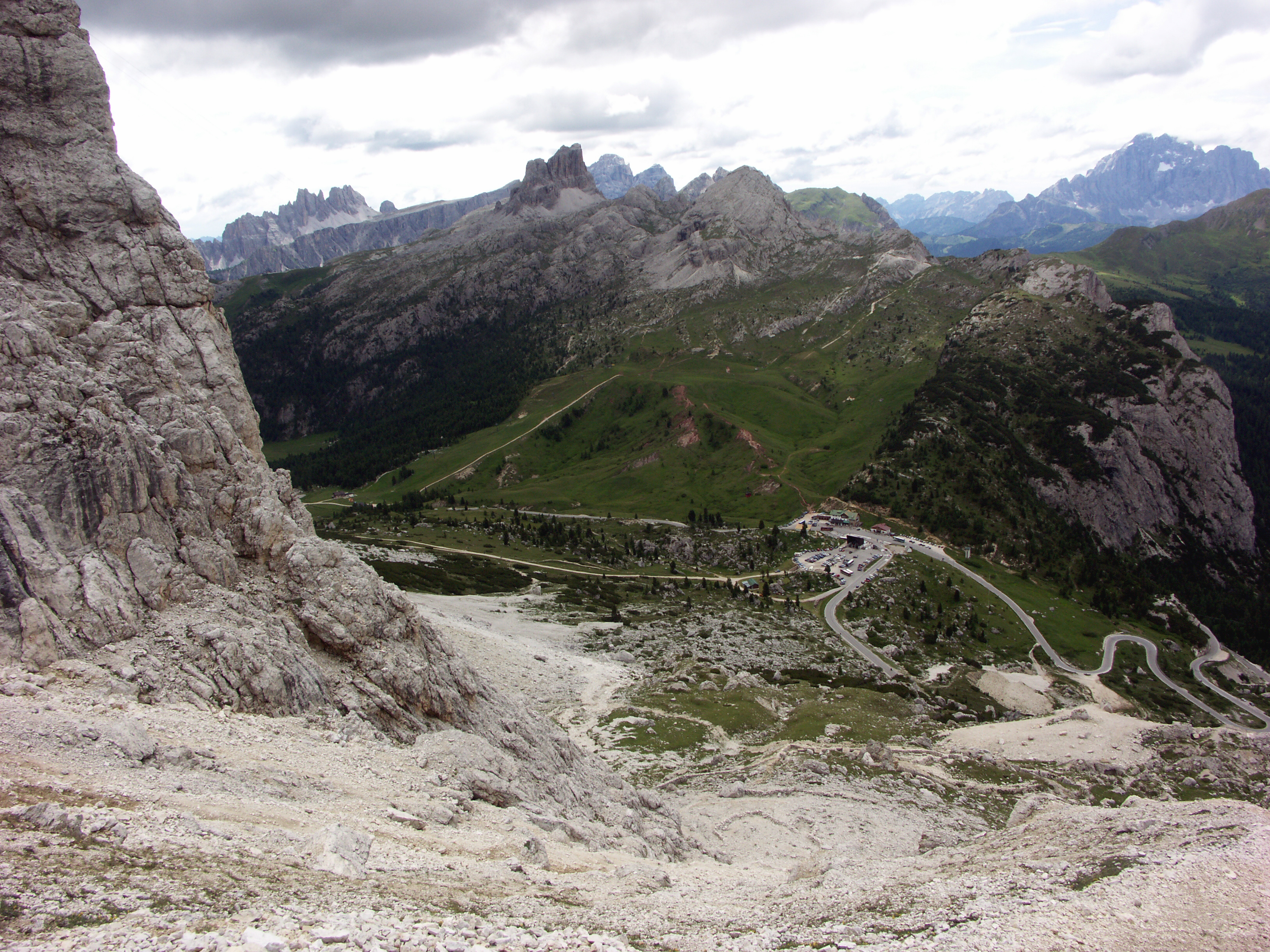 Italien, Dolomiten, Blick auf den Falzarego-Pass vom Aufstieg auf den Kleinen Lagazuoi